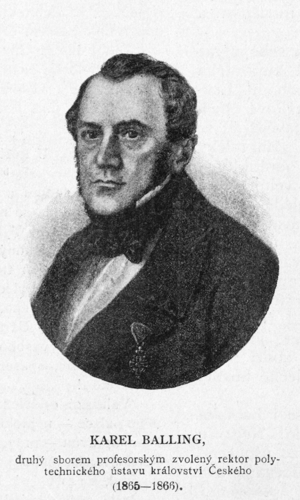 Karl Josef Napoleon Balling (1805–1868) war ein österreichischer Chemiker und Hüttenmann.